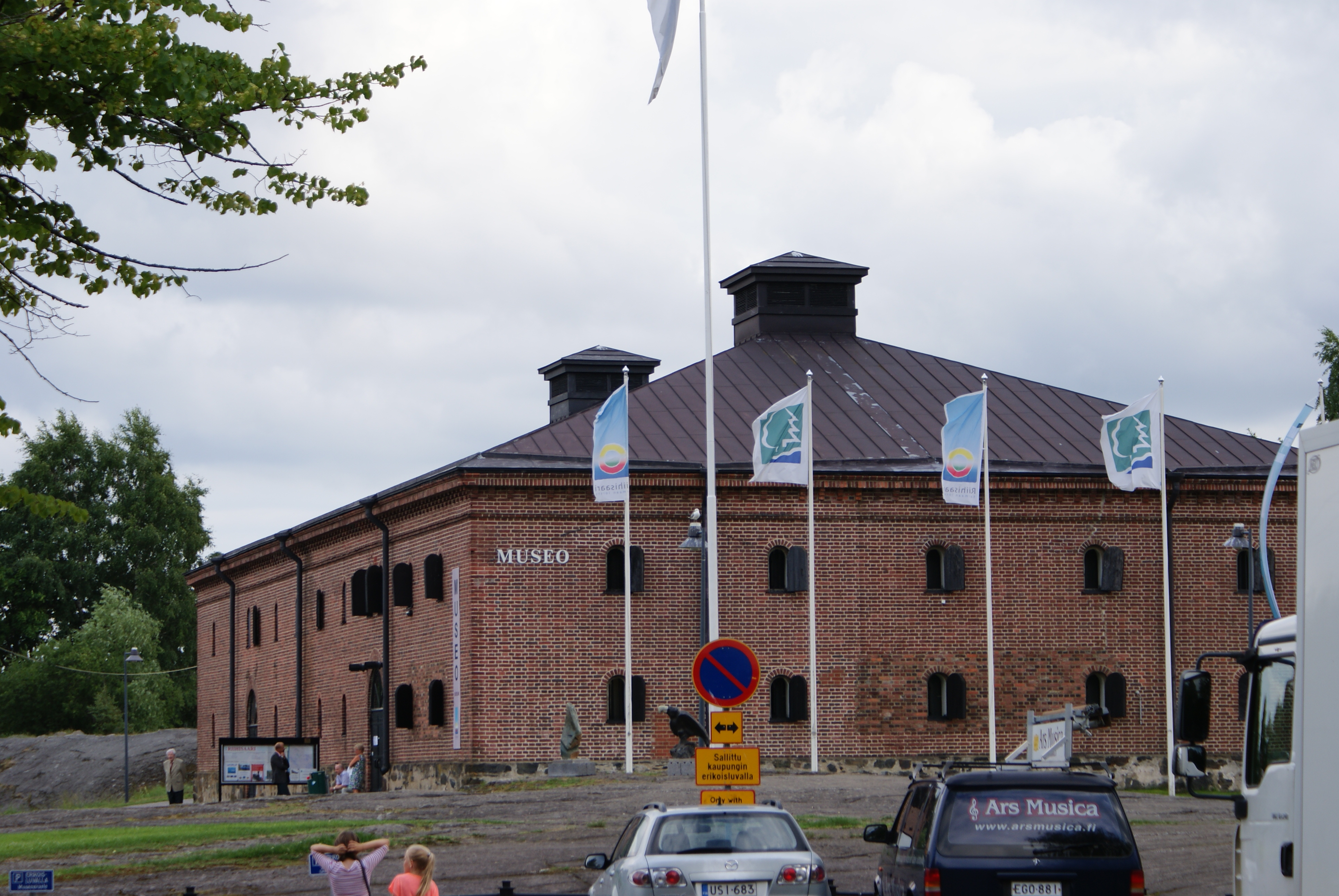 Båtmuseum i Savonlinna.